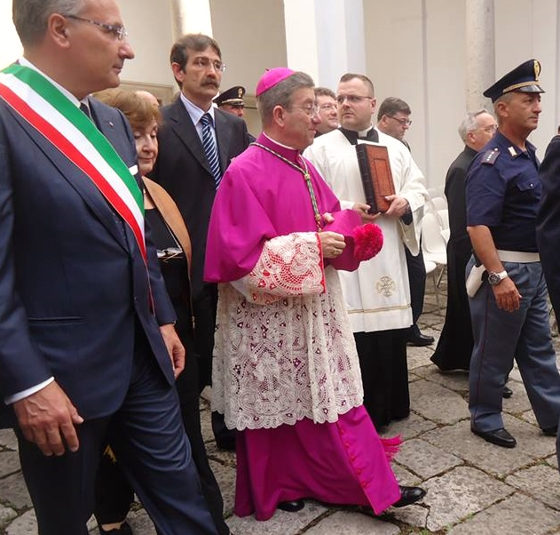 Accoglienza di S.E. Rev.ma Mons. Salvatore Visco nella Citta di Capua